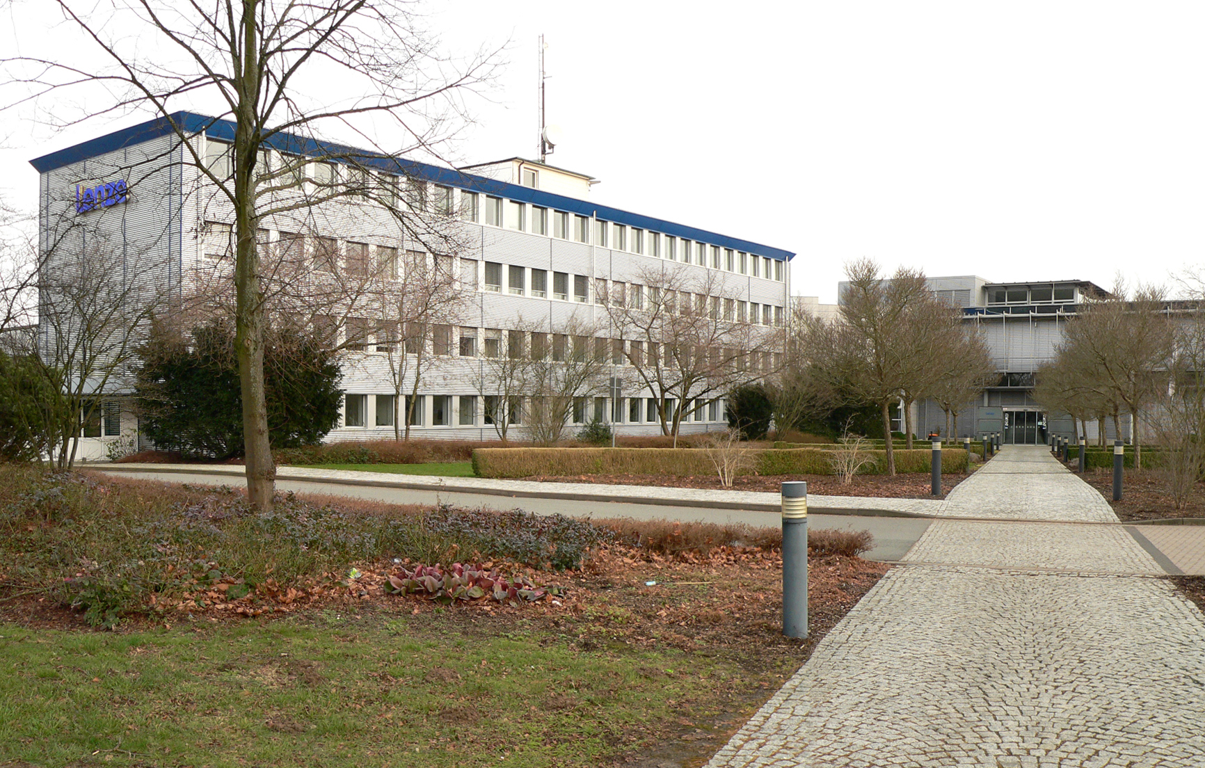 Firmensitz Lenze